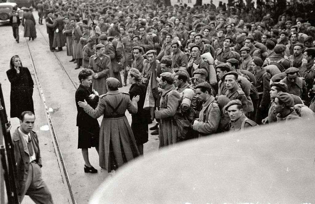 Título original: Despedida a los soldados integrantes de la División Azul tras una comida en el patio del Hospital Militar Mola antes de partir (11/20) Localización: San Sebastián (Guipúzcoa)